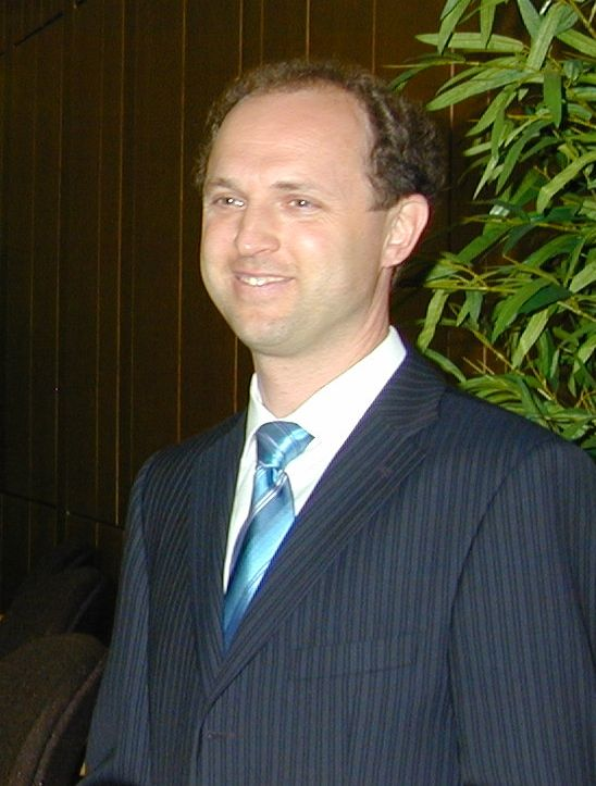 Tilman Bollacher nach seiner ersten Wahl zum Landrat des Landkreises Waldshut